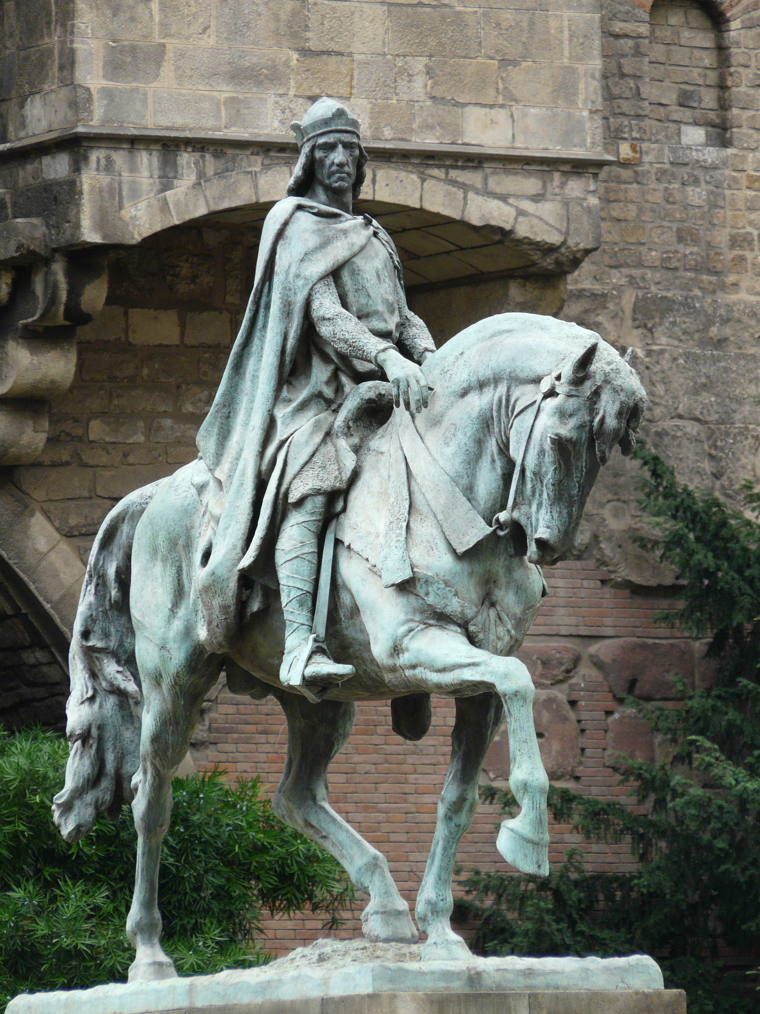 Monument eqüestre a Ramon Berenguer III. Pl. Ramon Berenguer el Gran (Barcelona). Object location41° 23′ 04.01″ N, 2° 10′ 39.96″ E